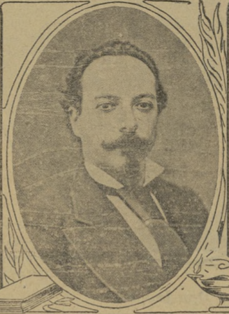 Leandro Herrero, segundo director de "El Correo Español"